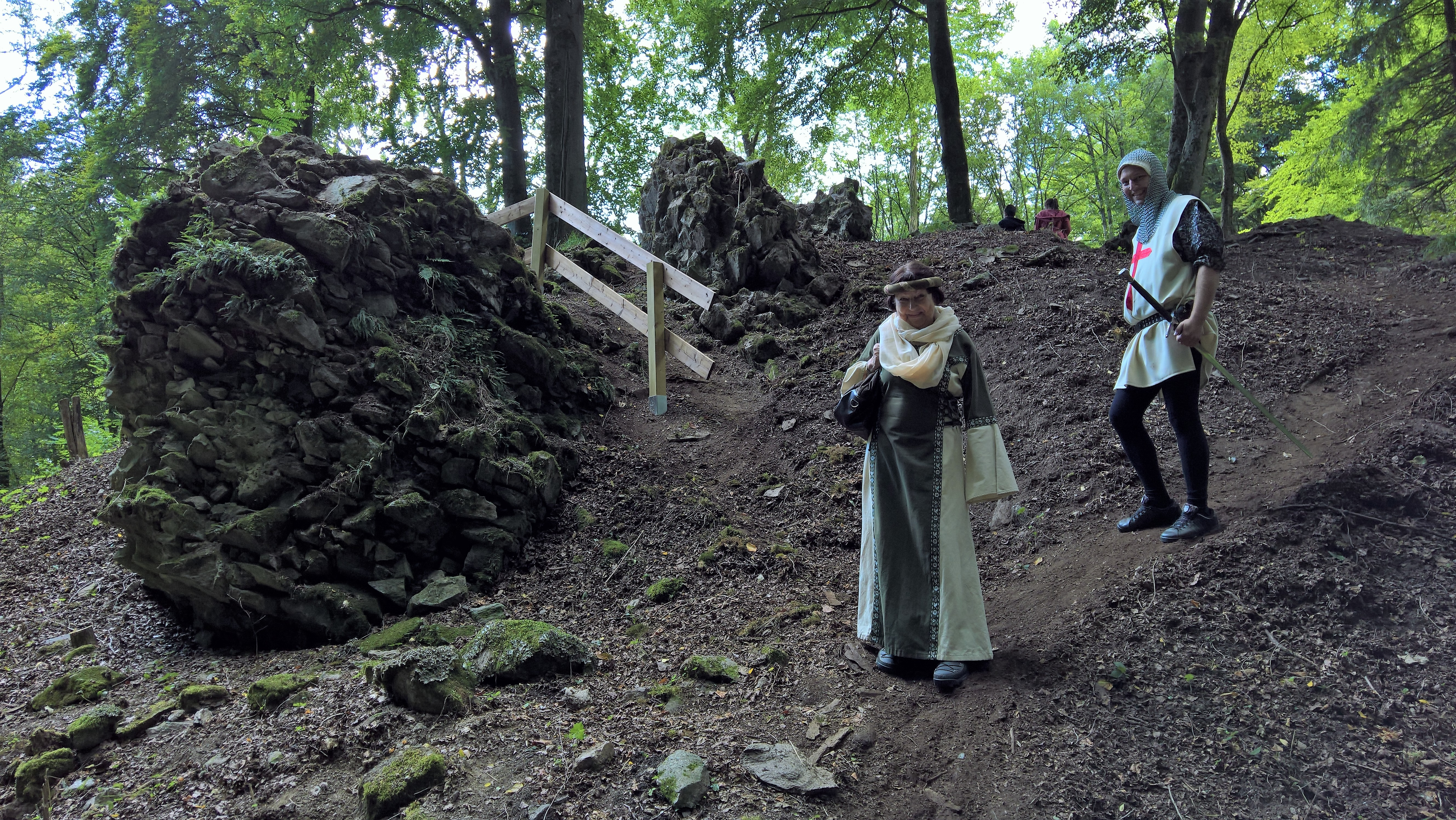 Die alten erhaltenen Reste der Burgruine vom Burggraben aus; am Tag des Denkmals mit mittelalterlicher Besetzung